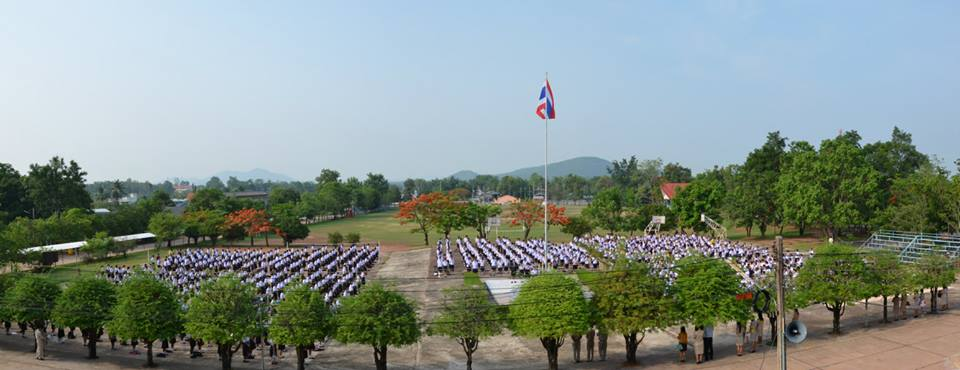 โรงเรียนนาวังศึกษาวิช